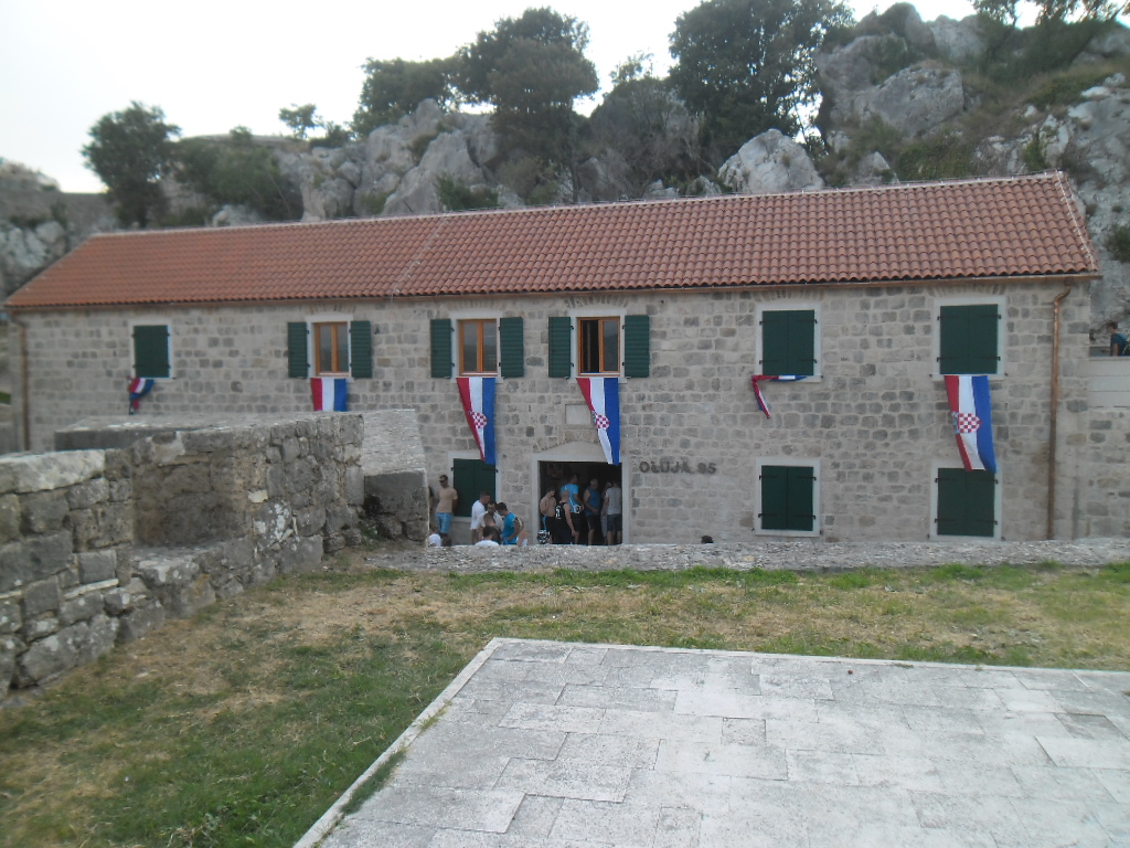 proslava Dana pobjede i domovinske zahvalnosti (20. obljetnice vojno-redarstvene operacije Oluje) u Kninu 5. kolovoza 2015.